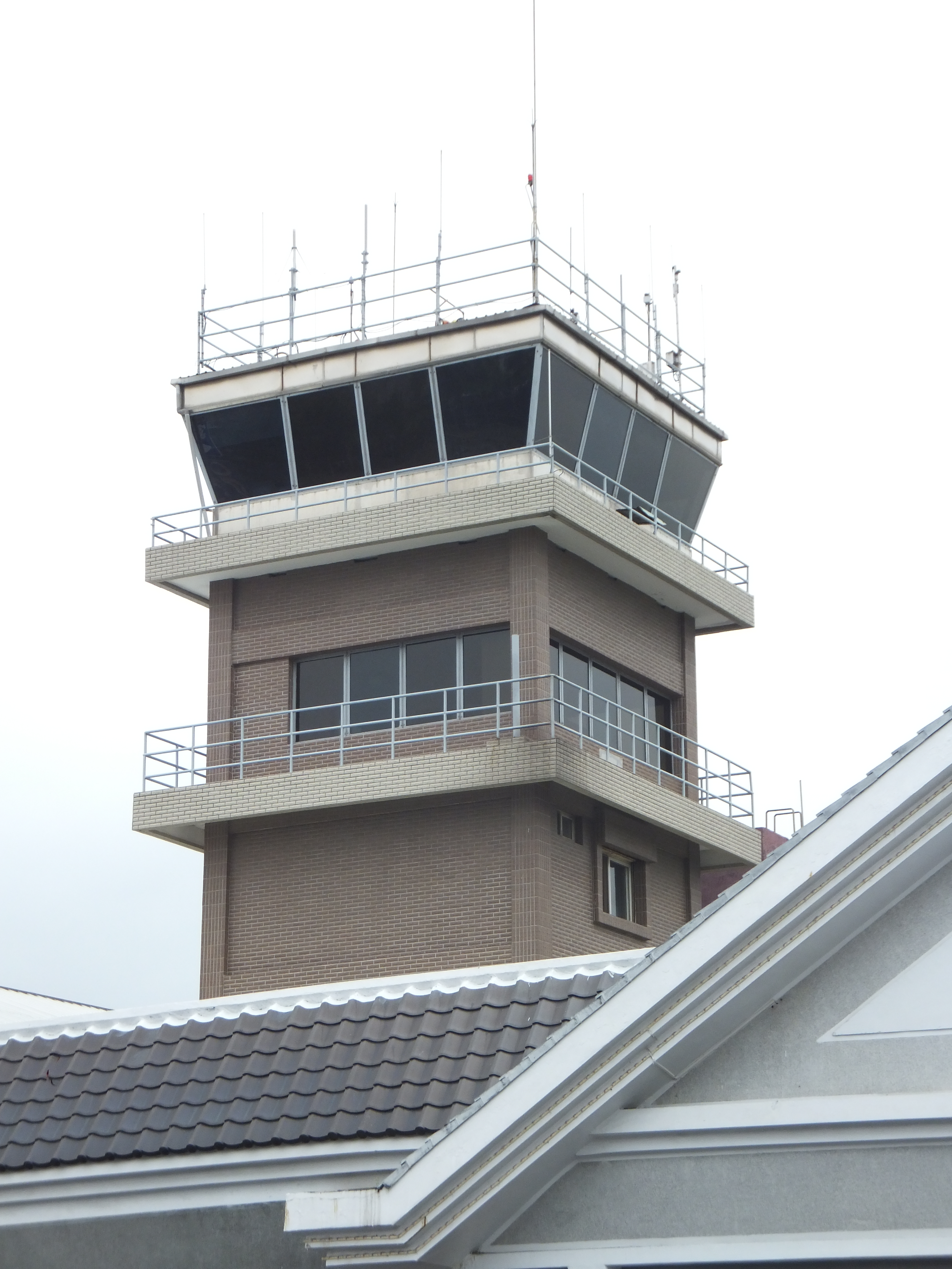 臺東機場塔臺。